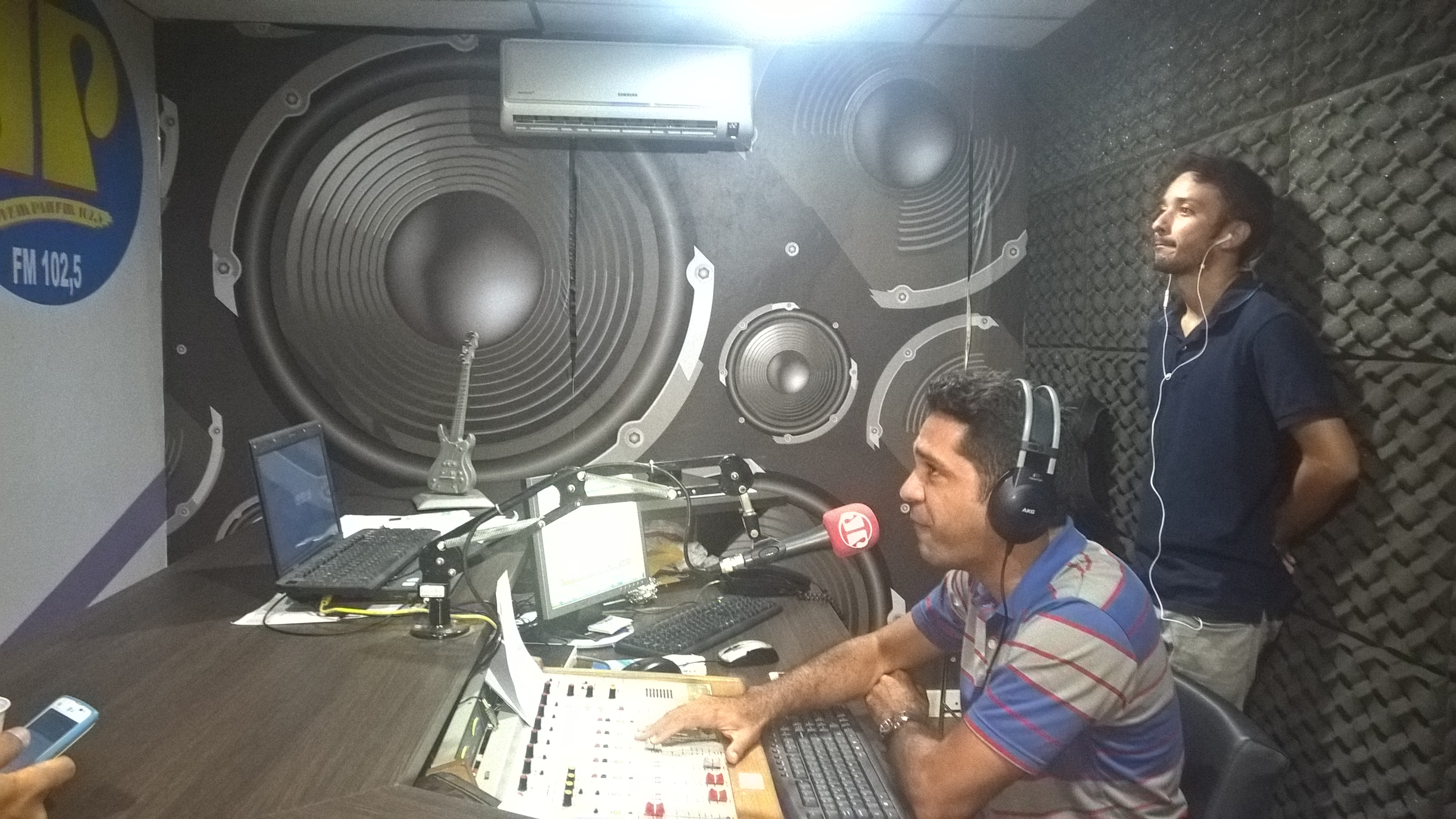 Estúdio da Jovem Pan FM São Luís, emissora de rádio sediada em São Luís, MA - Brasil